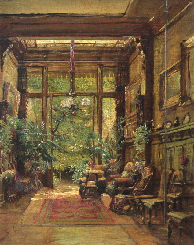 Interieur einer Villa mit Blick auf den Garten; Öl auf Leinwand, Provenienz: aus dem Künstlernachlaß Eugen Dücker, 48 cm x 38 cm